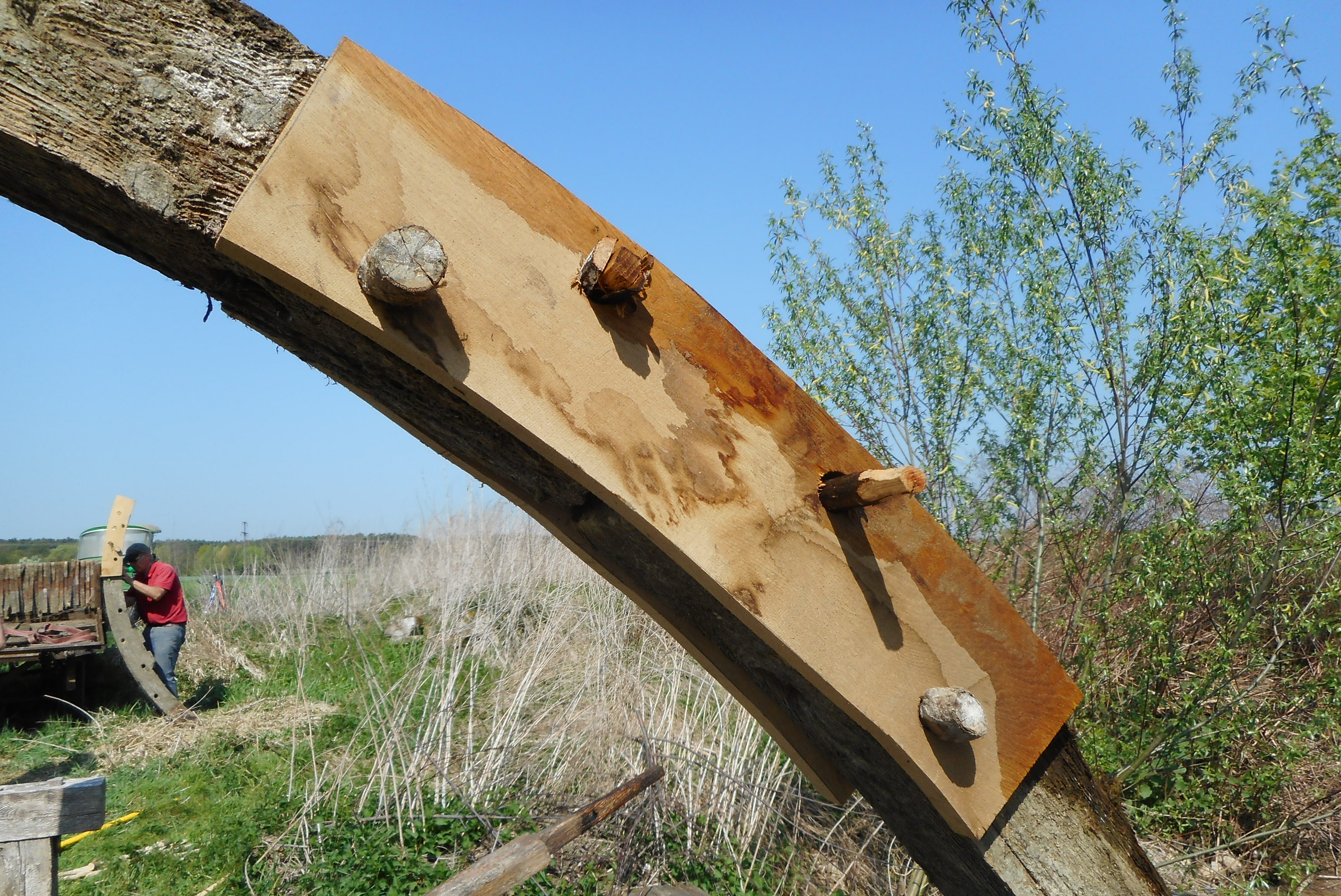 Detail Möhrendorfer Wasserschöpfräder: 2 Krümmlinge verbunden durch zwei Schetterbretter und 4 Schetternägeln